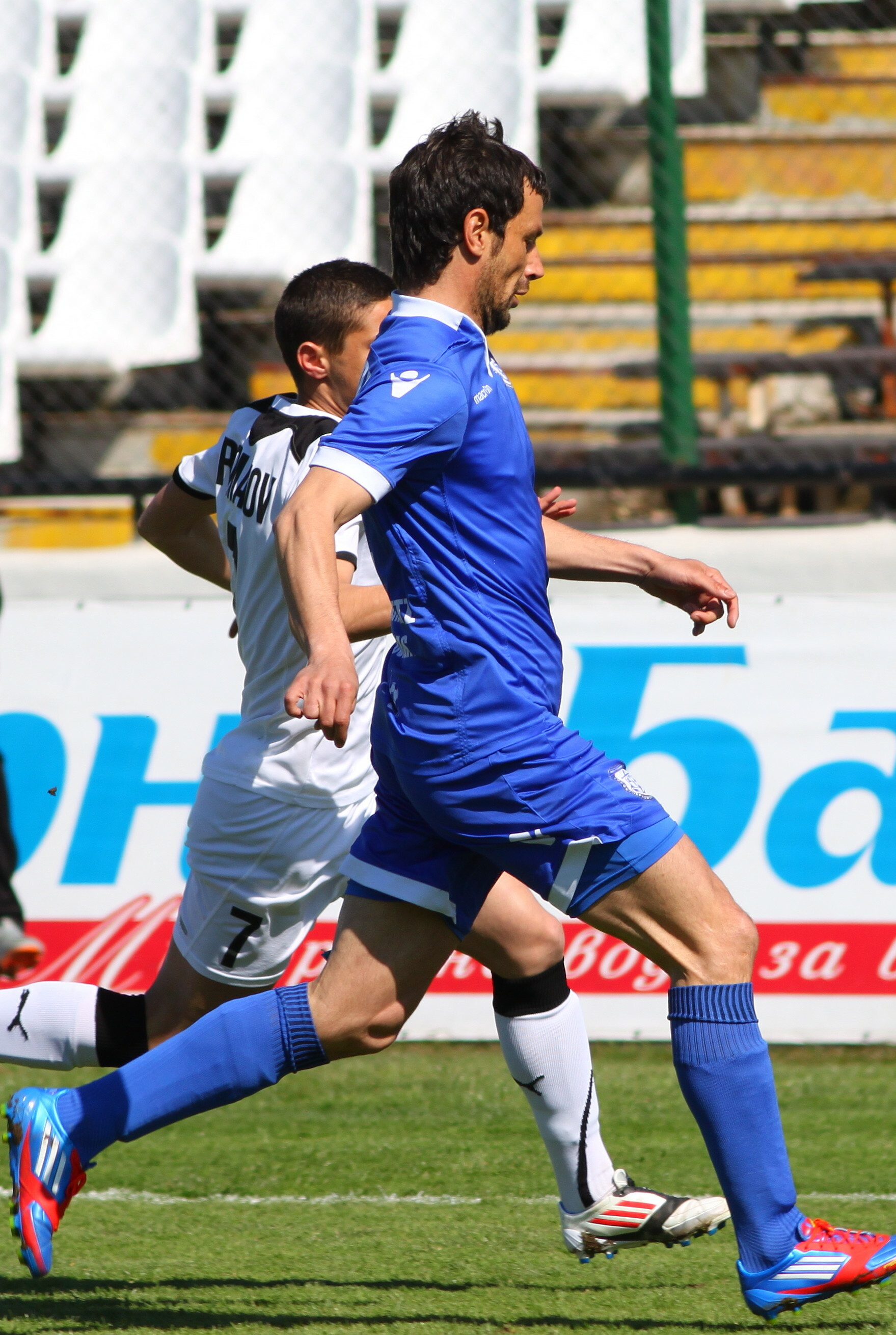 Траян Дянков (роден на 21 юни 1976) е български футболист, който в момента играе за Черноморец (Бургас) като защитник